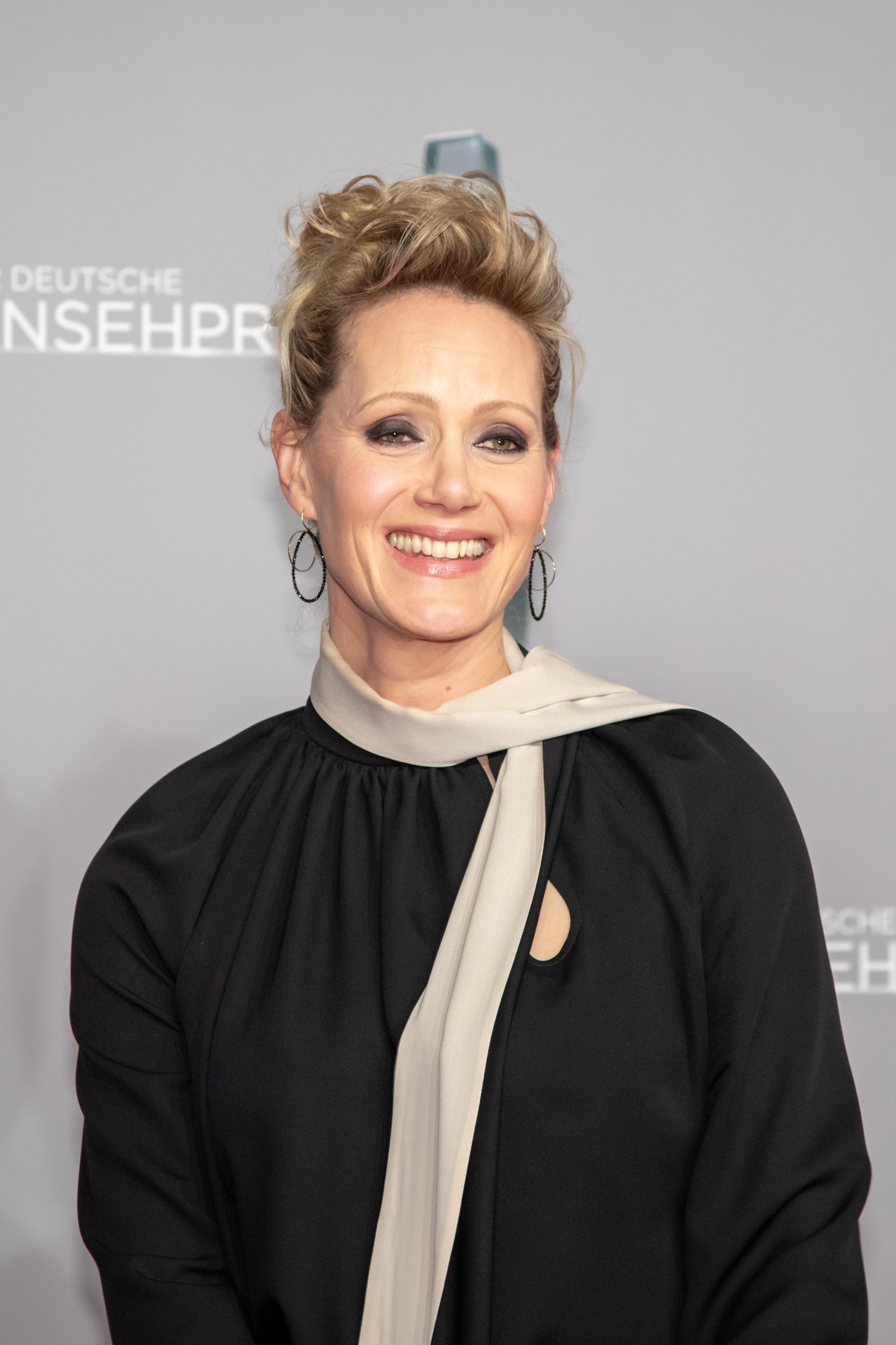 Anna Schudt beim Deutschen Fernsehpreis 2019 in der Düsseldorfer Rheinterrasse